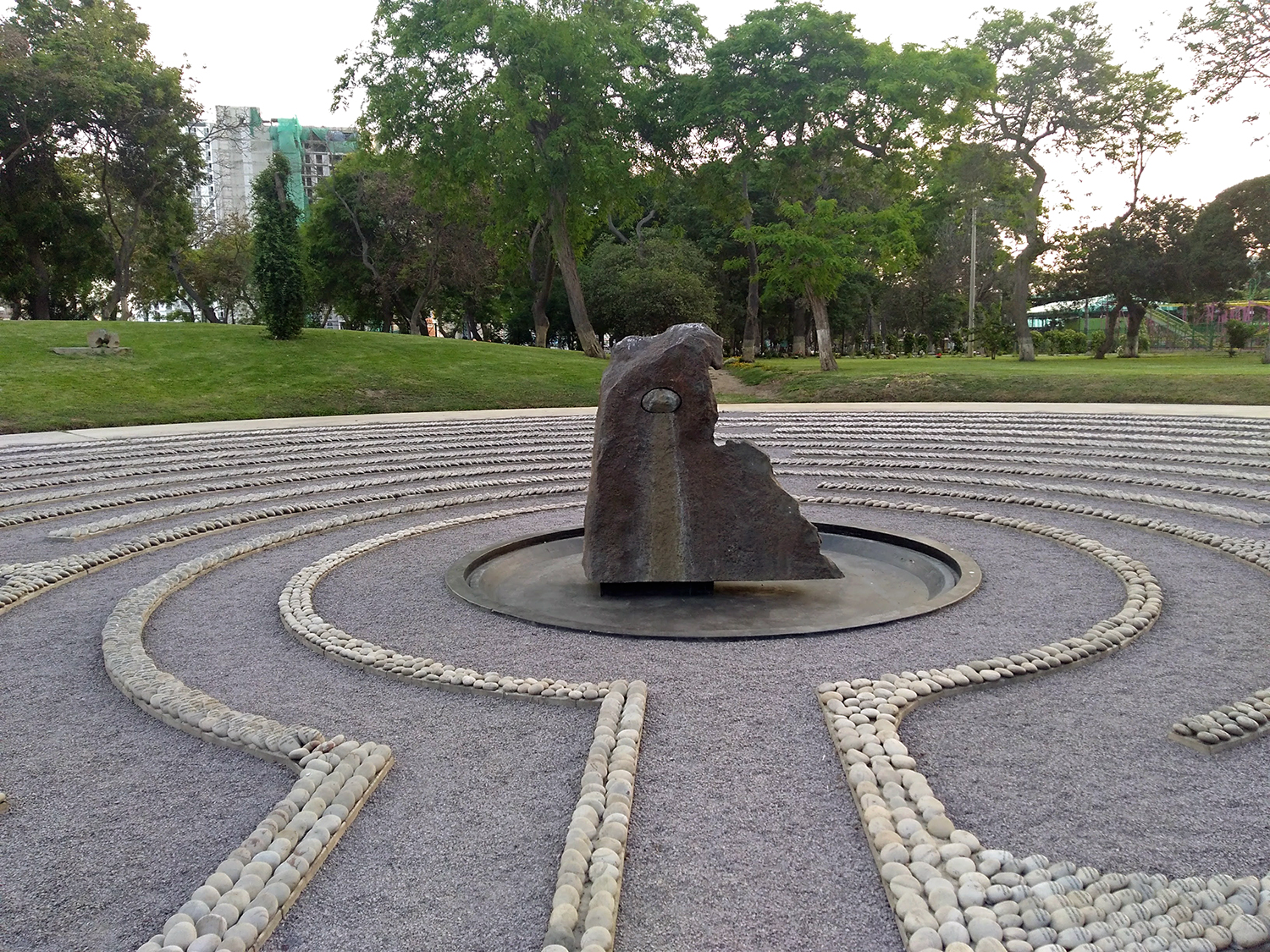 Memorial El ojo que llora, obra de la escultora holandesa radicada en el Perú Lika Mutal, realizado en homenaje a las victimas del conflicto armado interno en el Perú. Este monumento fue declarado patrimonio cultural de la nación por el Ministerio de Cultura del Perú en el año 2013.